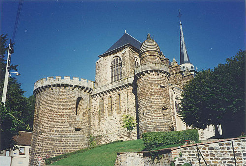 L'église Saint-Pierre de Toucy, façade ouest. "Tour des évêques" à gauche, "tour Saint-Michel" à droite.